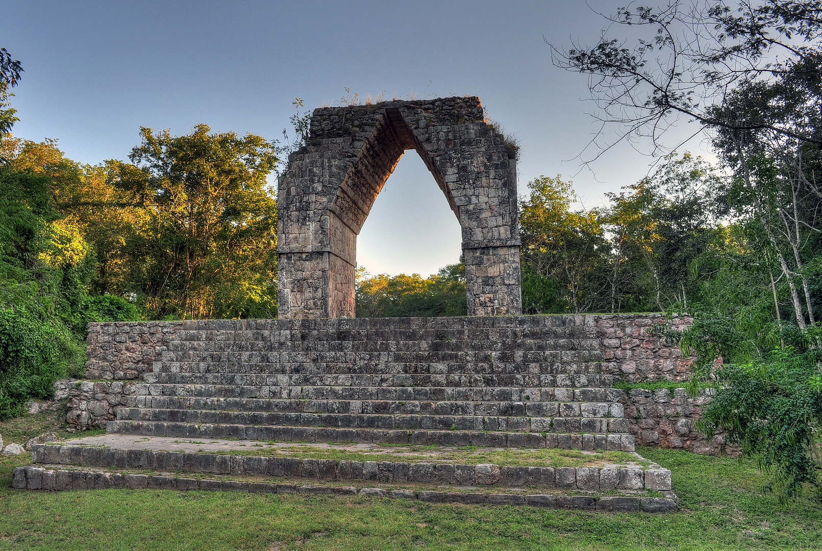 Kabah, el Arco